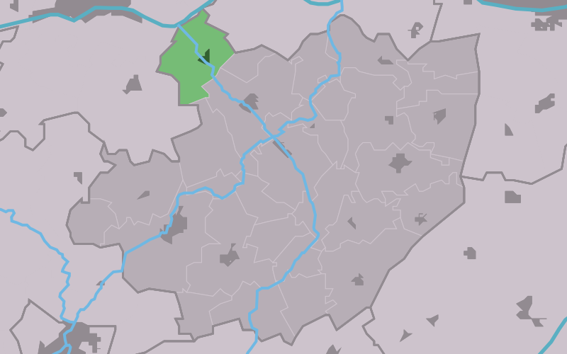 Kaartsje fan himrik fan Wjelsryp